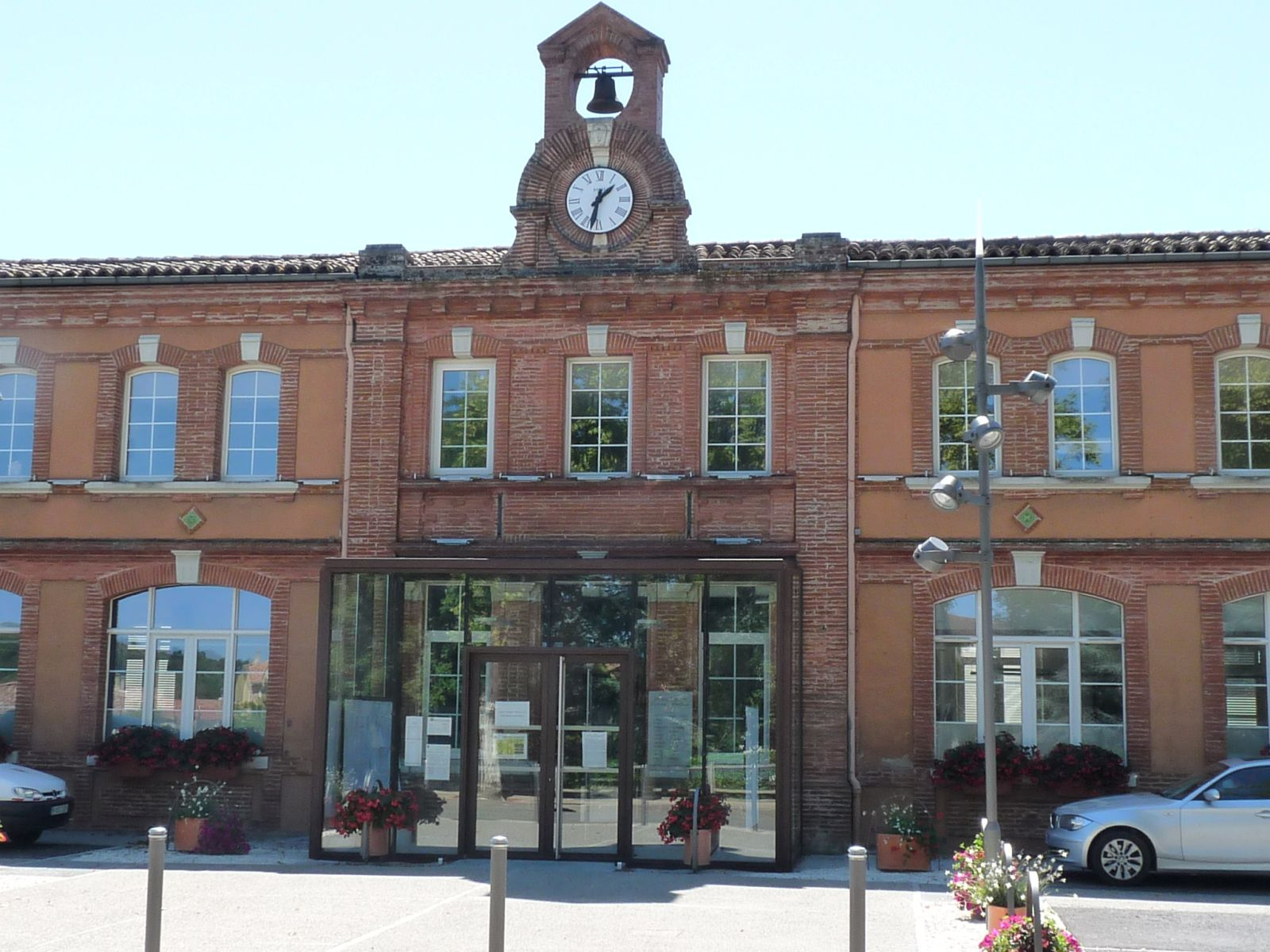 Mairie de Vernet, Haute-Garonne, France